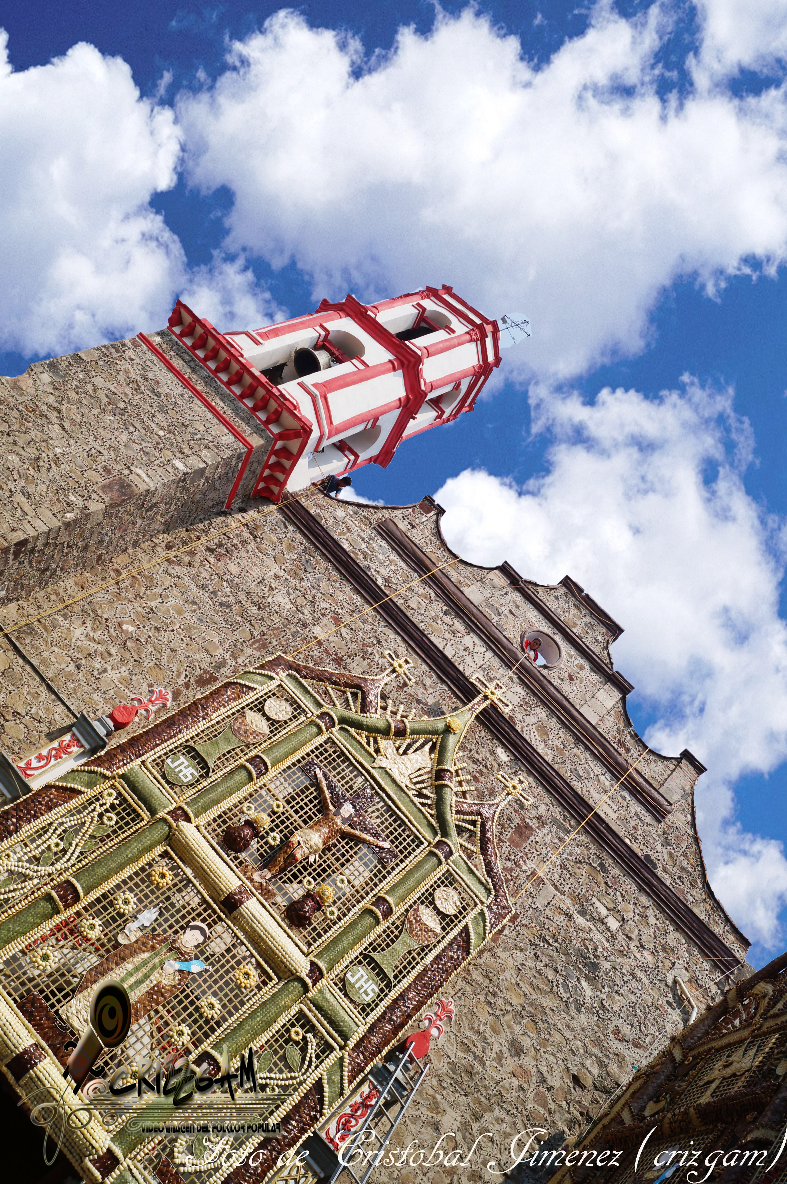 Foto HD, Parroquia San Jacinto y Señor de los Milagros, Municipio de Ixtapaluca, Estado de México. 2013. This image contains digital watermarking or credits in the image itself. The usage of visible watermarks is discouraged. If a non-watermarked version of the image is available, please upload it under the same file name and then remove this template. Ensure that removed information is present in the image description page and replace this template with metadata from image or attribution metadata from licensed image . Caution: Before removing a watermark from a copyrighted image, please read the WMF's analysis of the legal ramifications of doing so, as well as Commons' proposed policy regarding watermarks. If the old version is still useful, for example if removing the watermark damages the image significantly, upload the new version under a different title so that both can be used. After uploading the non-watermarked version, replace this template with superseded|new filename|version without watermarks .